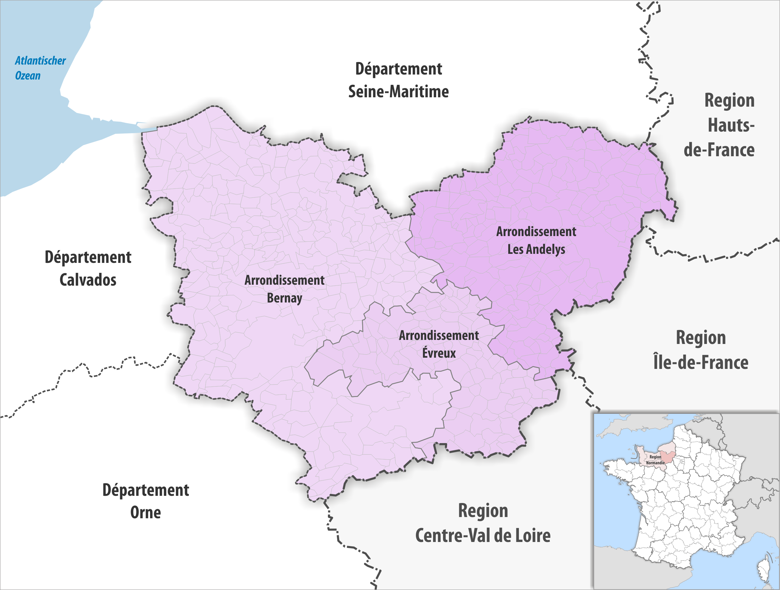 Gemeinden und Arrondissemente im Departement Eure